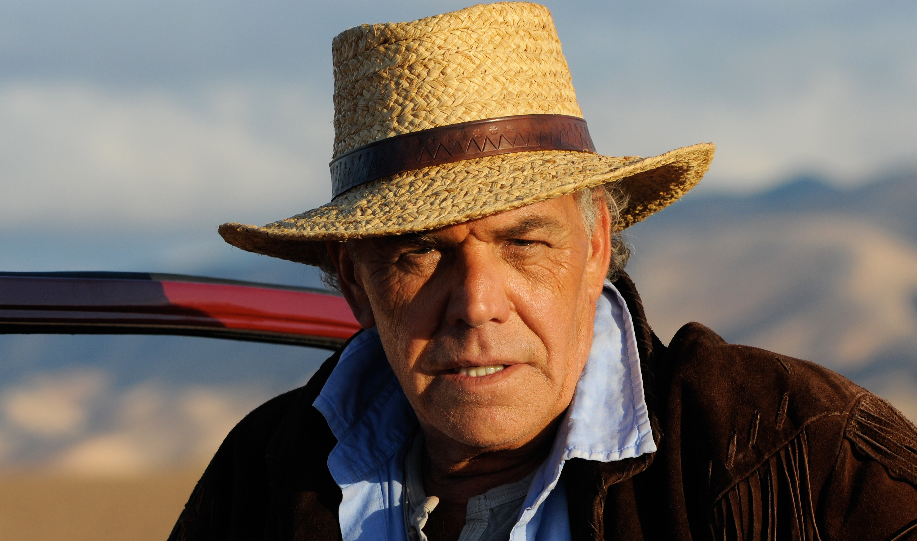 Christian Kohlund Traumhotel Foto Privat